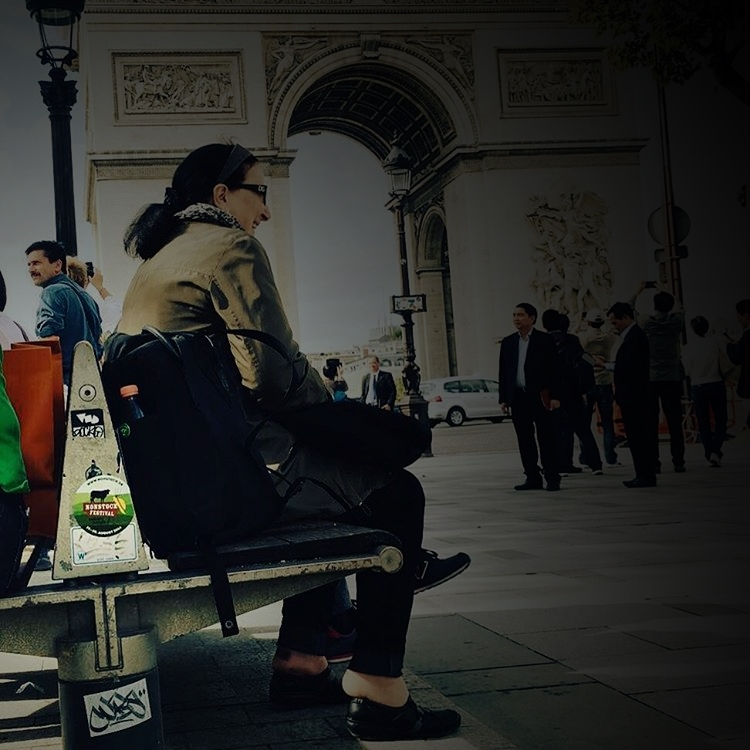 Nonstock Aufkleber auf einer Bank am Berliner Tor